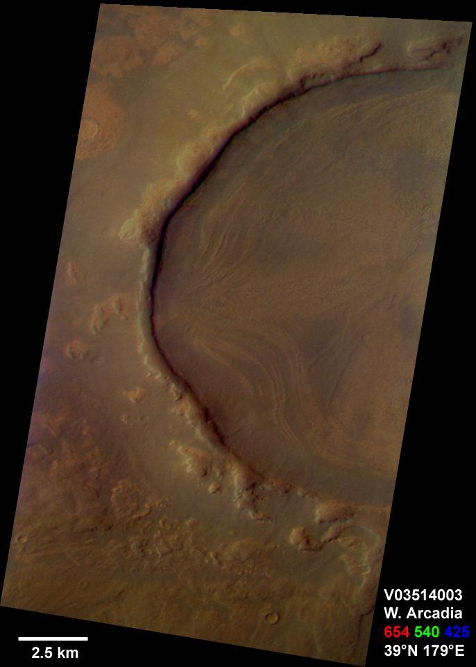 Die NASA-Raumsonde 2001 Mars Odyssey machte diese Aufnahme von einem Vulkan